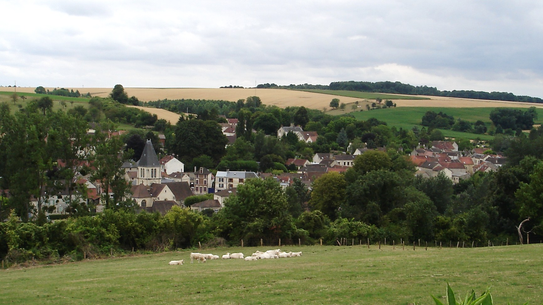 Vue panoramique de la ville de Chaussy située dans le département du Val d'Oise en Vexin (France)